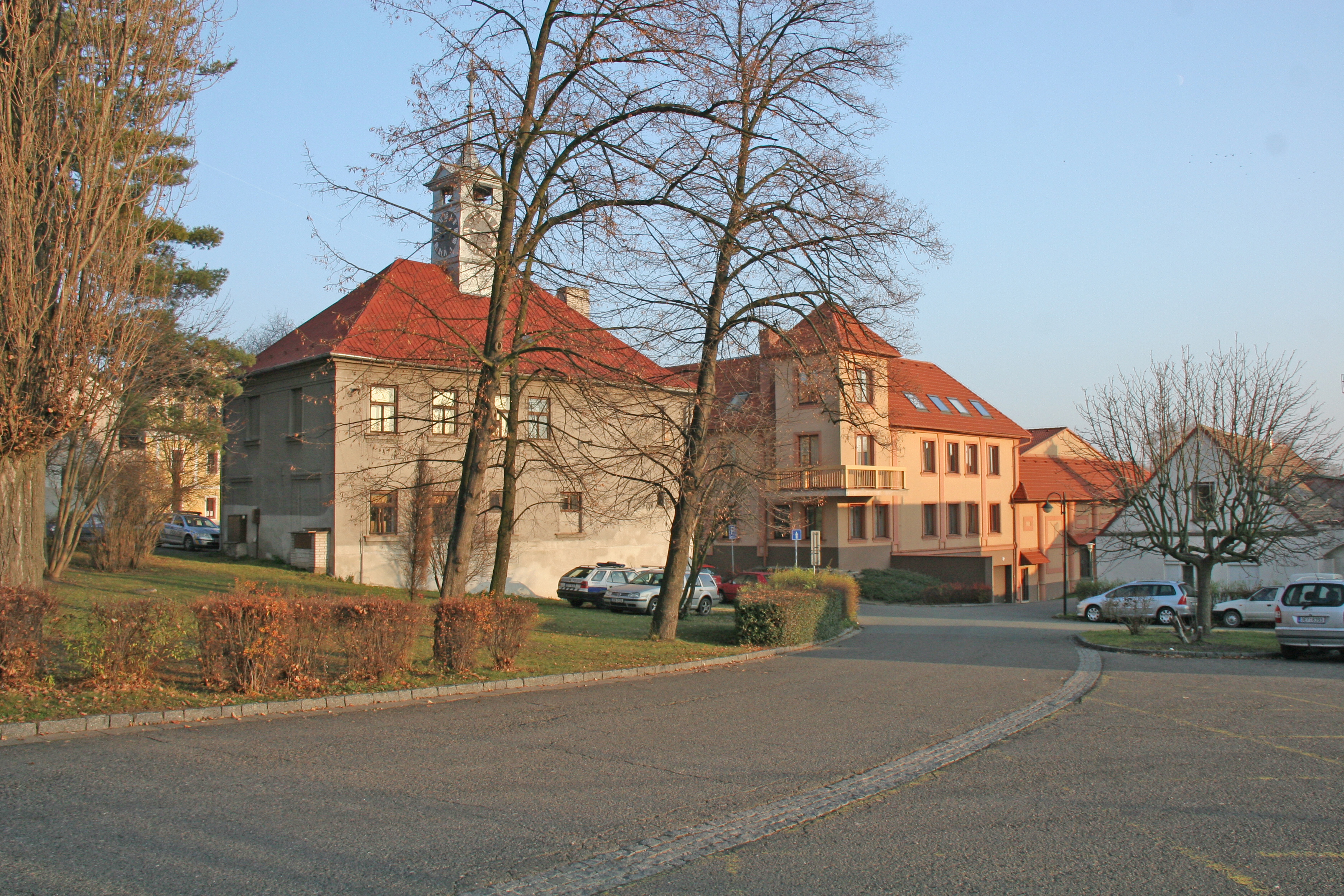 Husovo náměstí 48, Sezemice